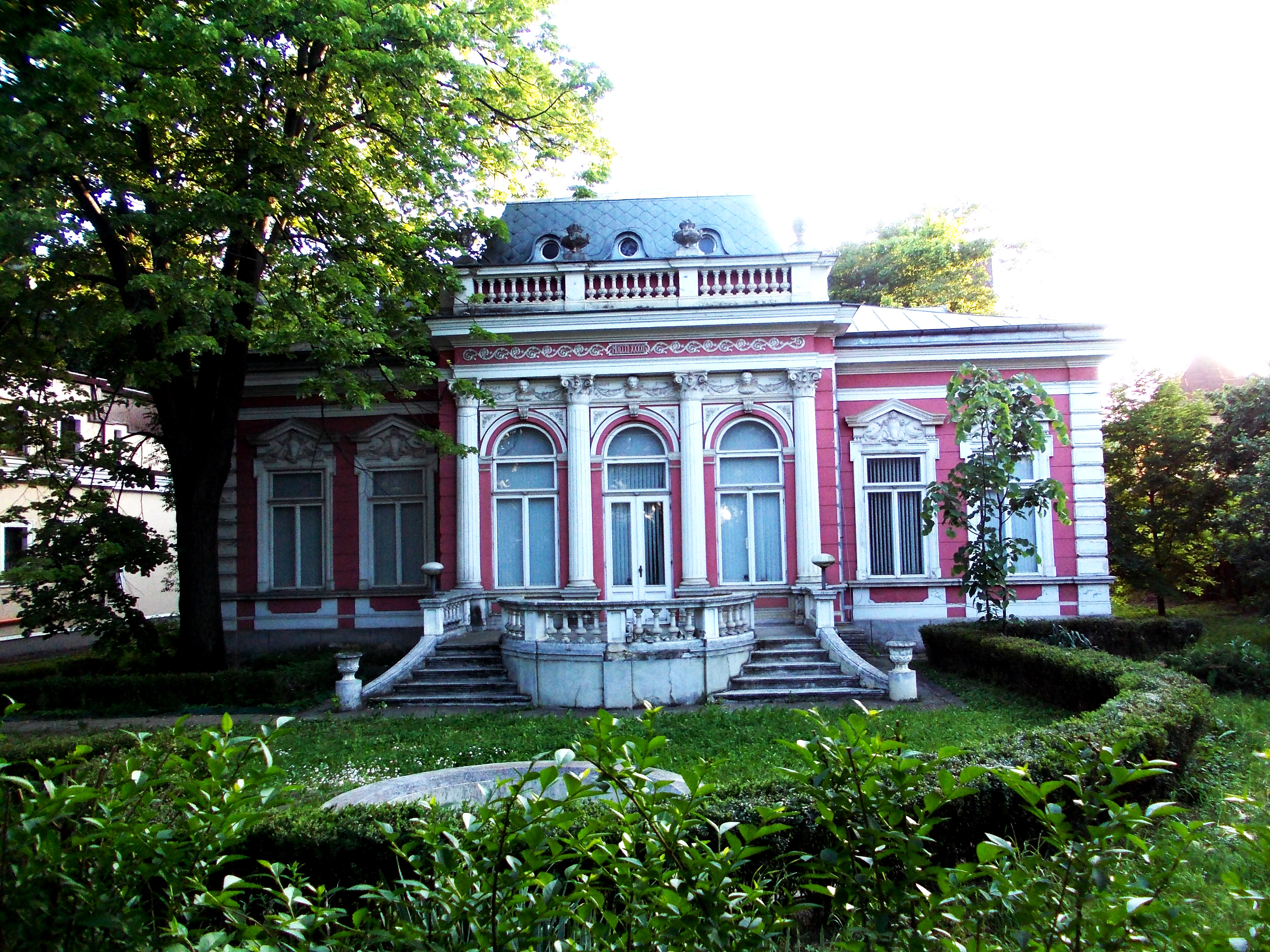 Casa Vălescu